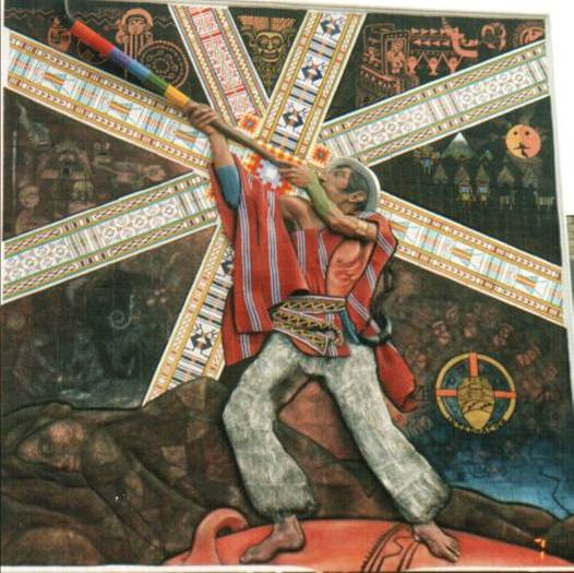 Escultomural "El último Guaminga"